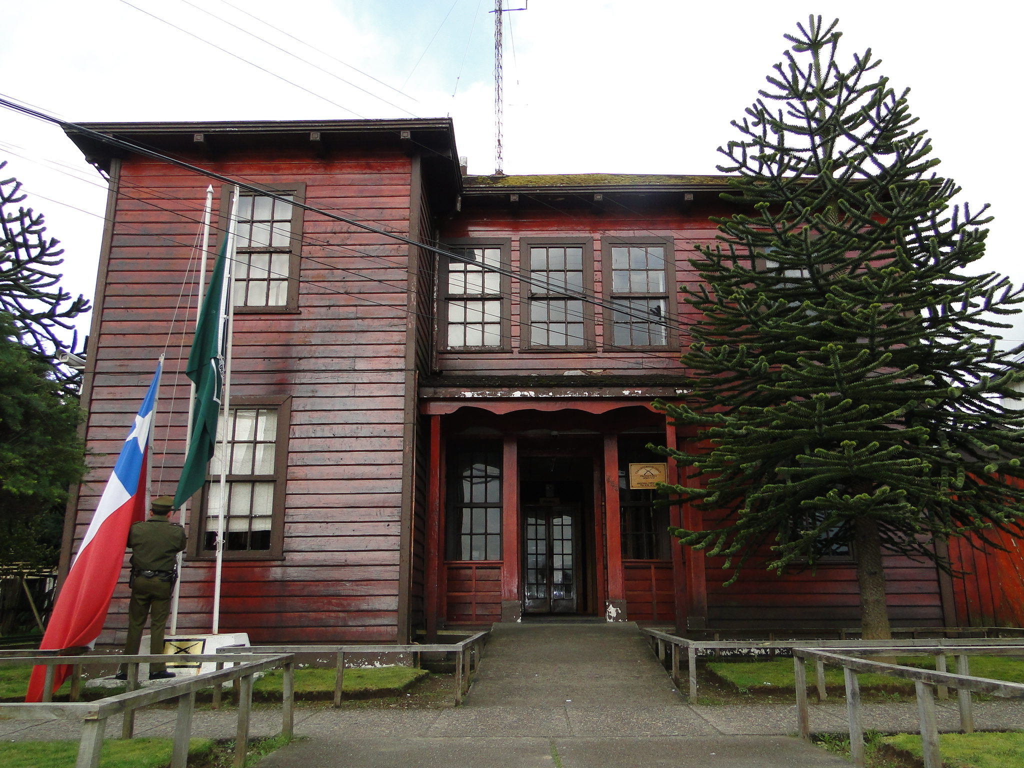 Oficina de Tierras y Colonización de Puerto Aysén This is a photo of a national monument in Chile: 2078